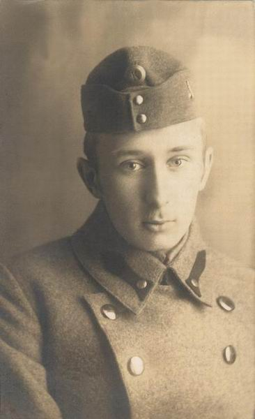 Békésy György magyar Nobel-díjas fizikus 1918 körül